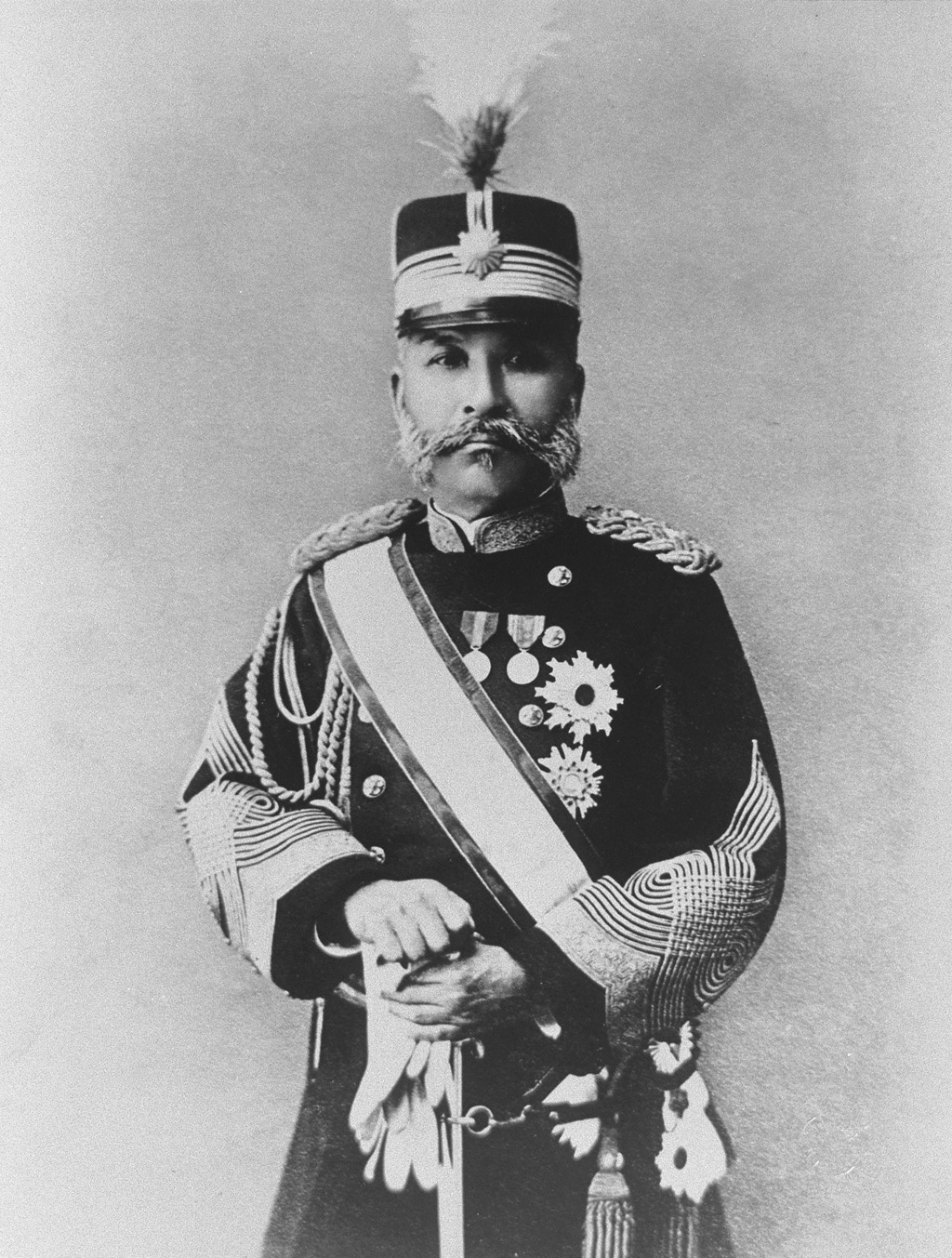 Portrait of Soga Sukenori/Sukeyuki (曾我祐準, 1844 – 1935)